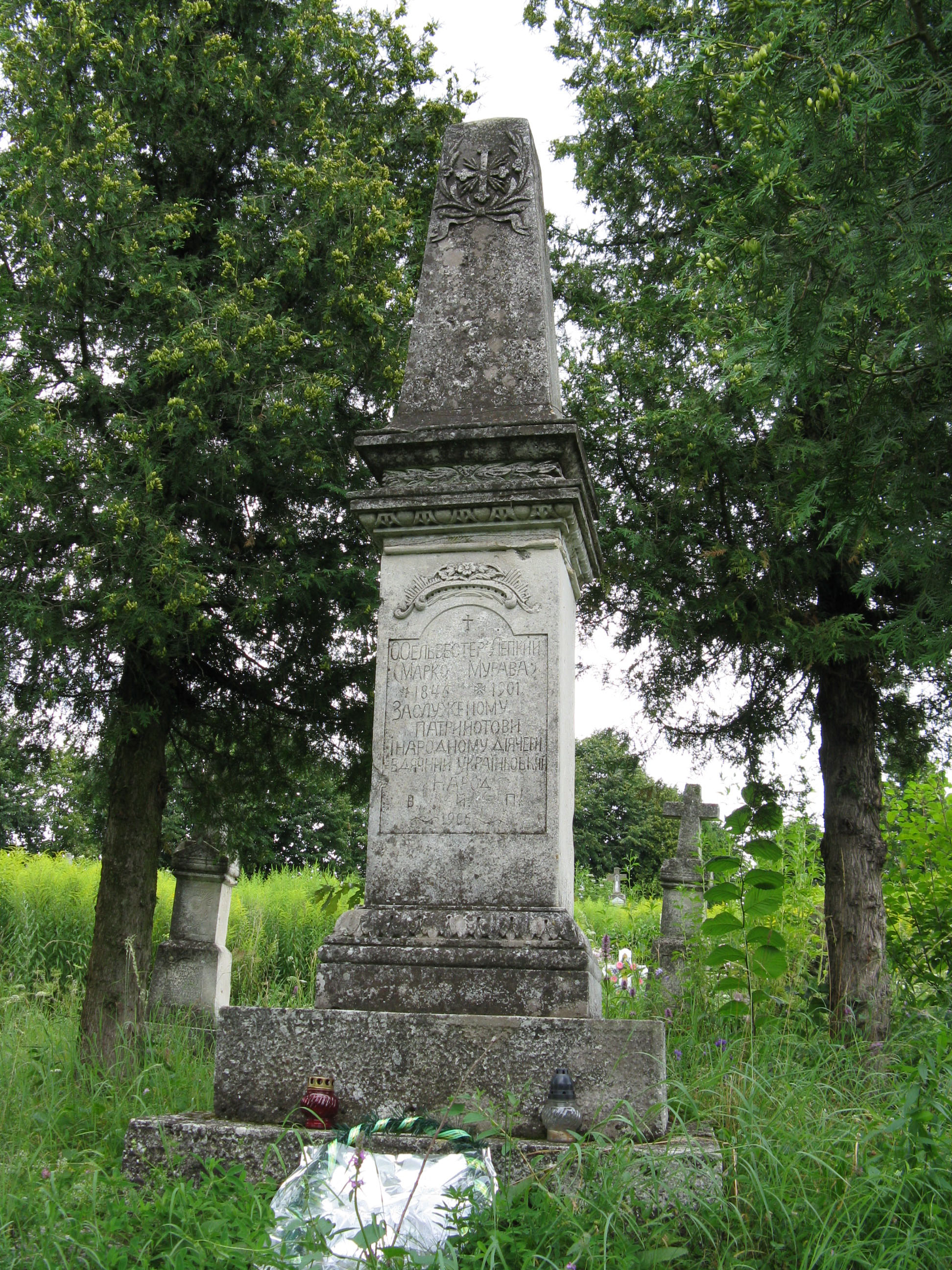 Могила о. Сильвестра Лепкого (літературний псевдонім Марко Мурава), батька письменника Богдана Лепкого на Жуківському цвинтарі